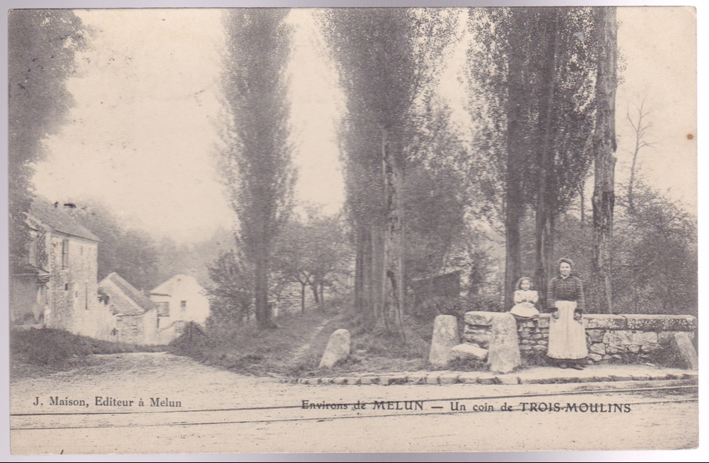 Carte postale du début du XXème siècle aux Trois Moulins à Melun avec au premier plan les rails du tramway de Verneuil.